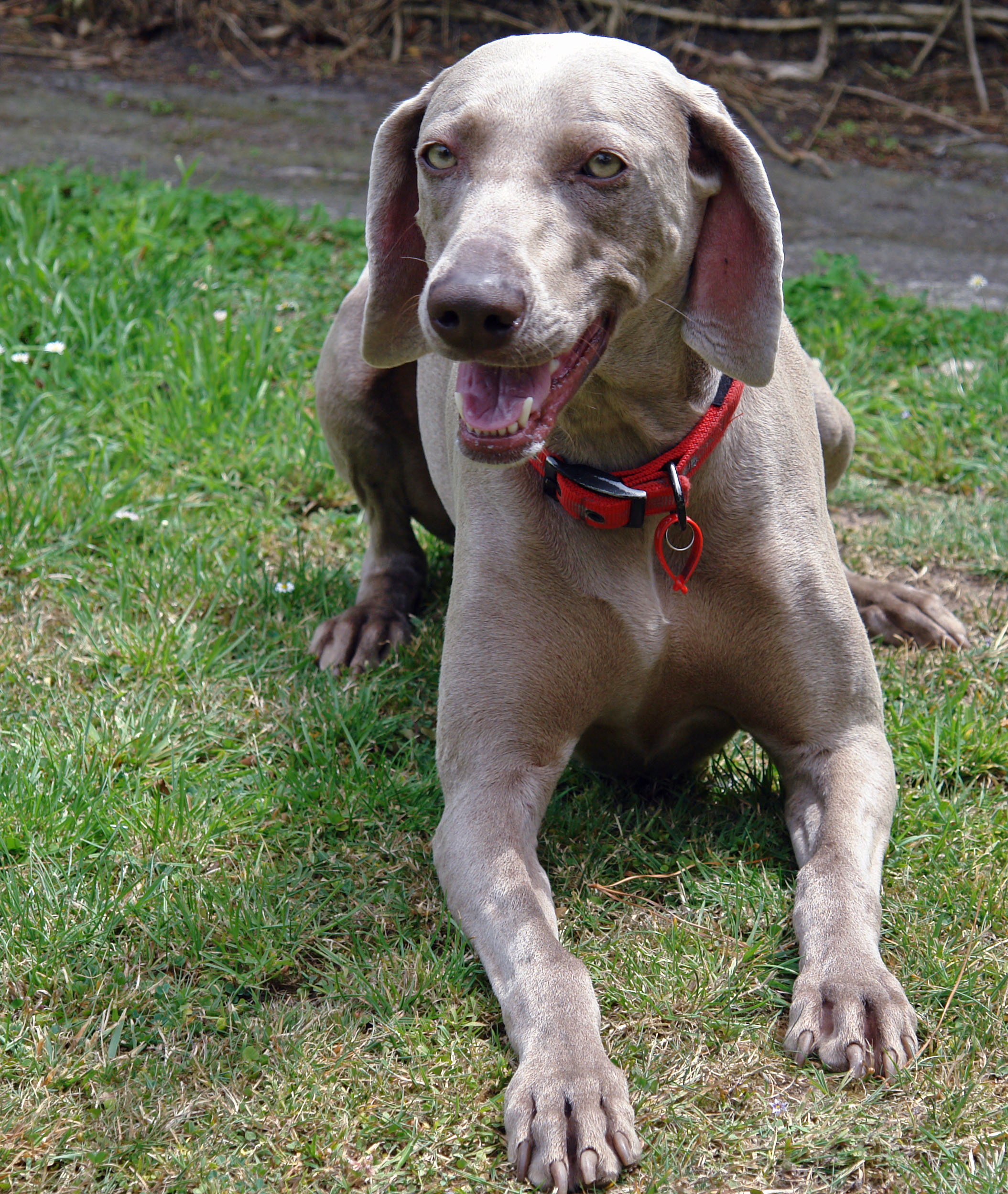 A Weimaraner.